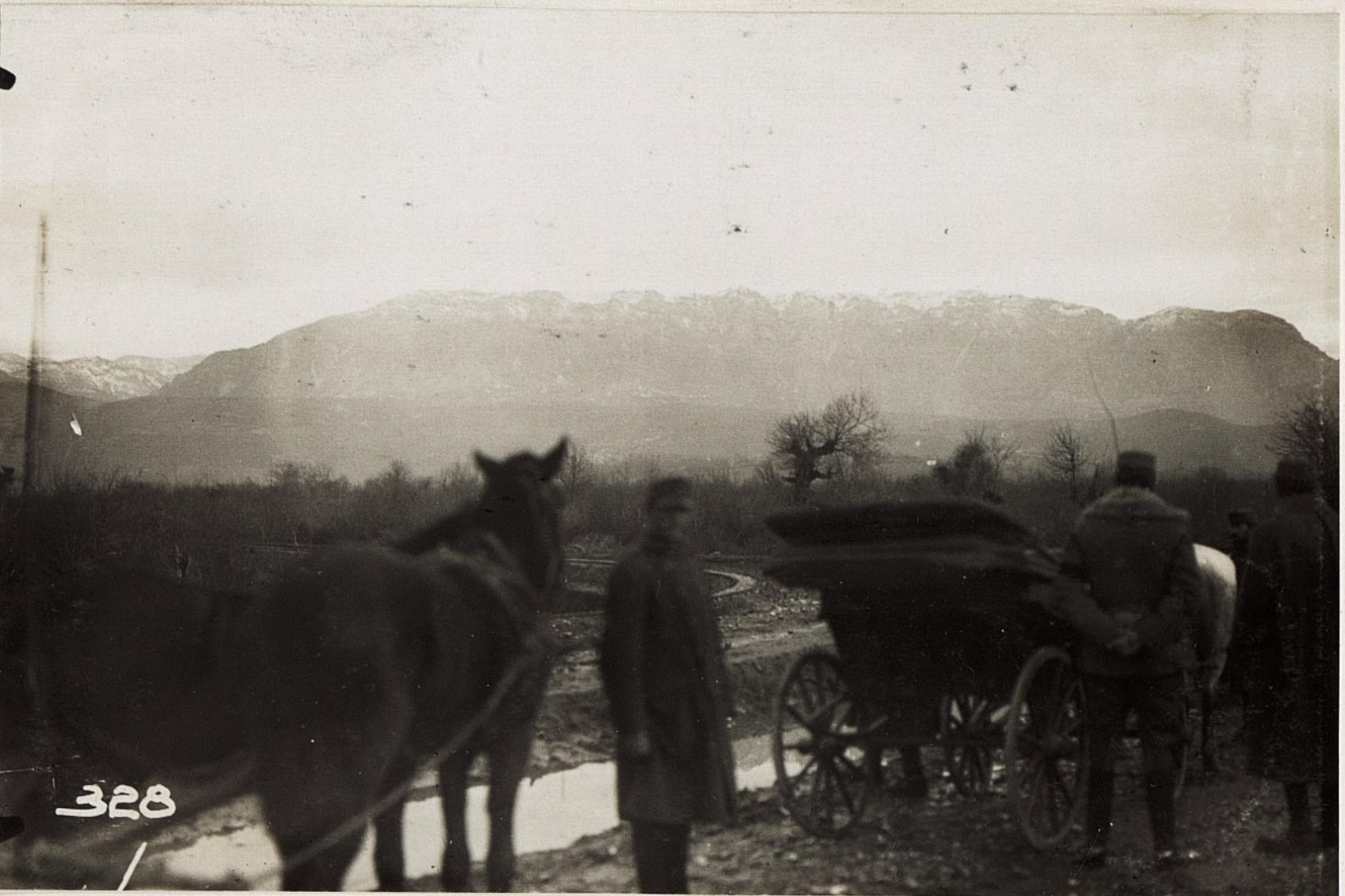 Wagenfahrt nach Kruja.